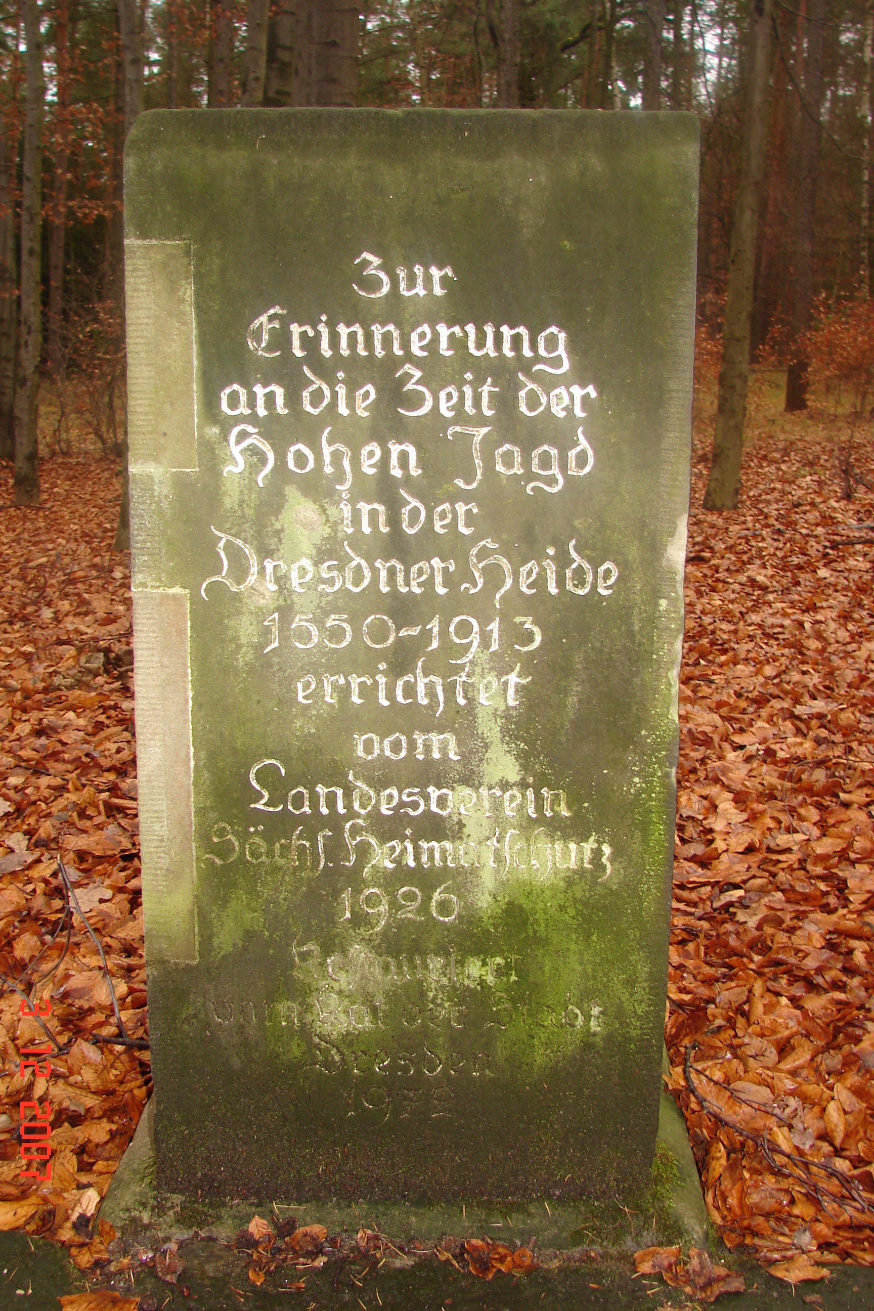 Gedenkstein im Dresdner Saugarten, auf allen vier Seiten beschriftet - zum Gedenken an die Treibjagden in der Dresdner Heide, die Anlage des "Treybegartens", das Pöppelmannsche Herrenhaus und die Anlage des "Ruhe- und Rückgartens"